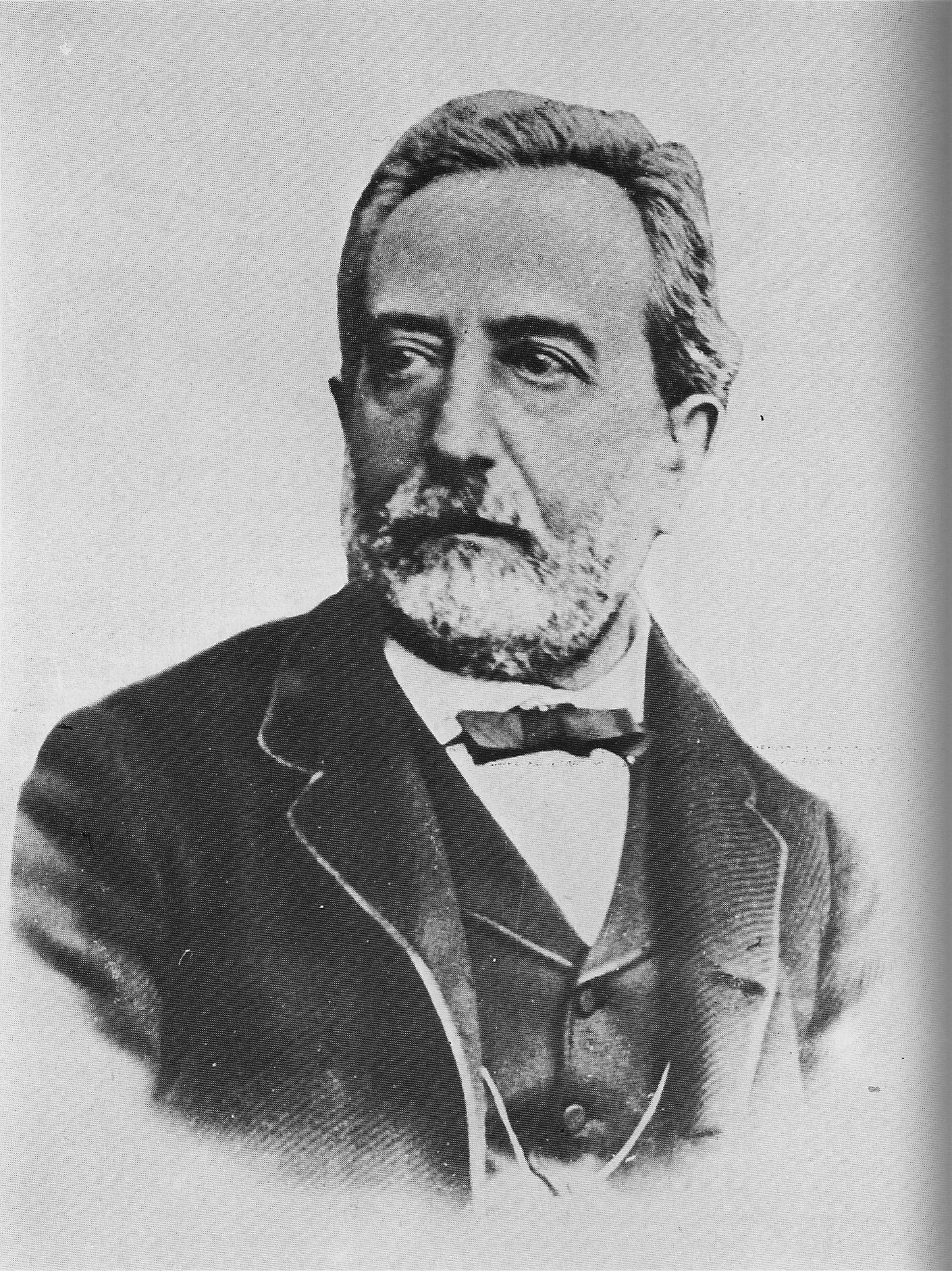 Luigi Solidati Tiburzi (1825-1889), deputato e senatore del Regno d'Italia